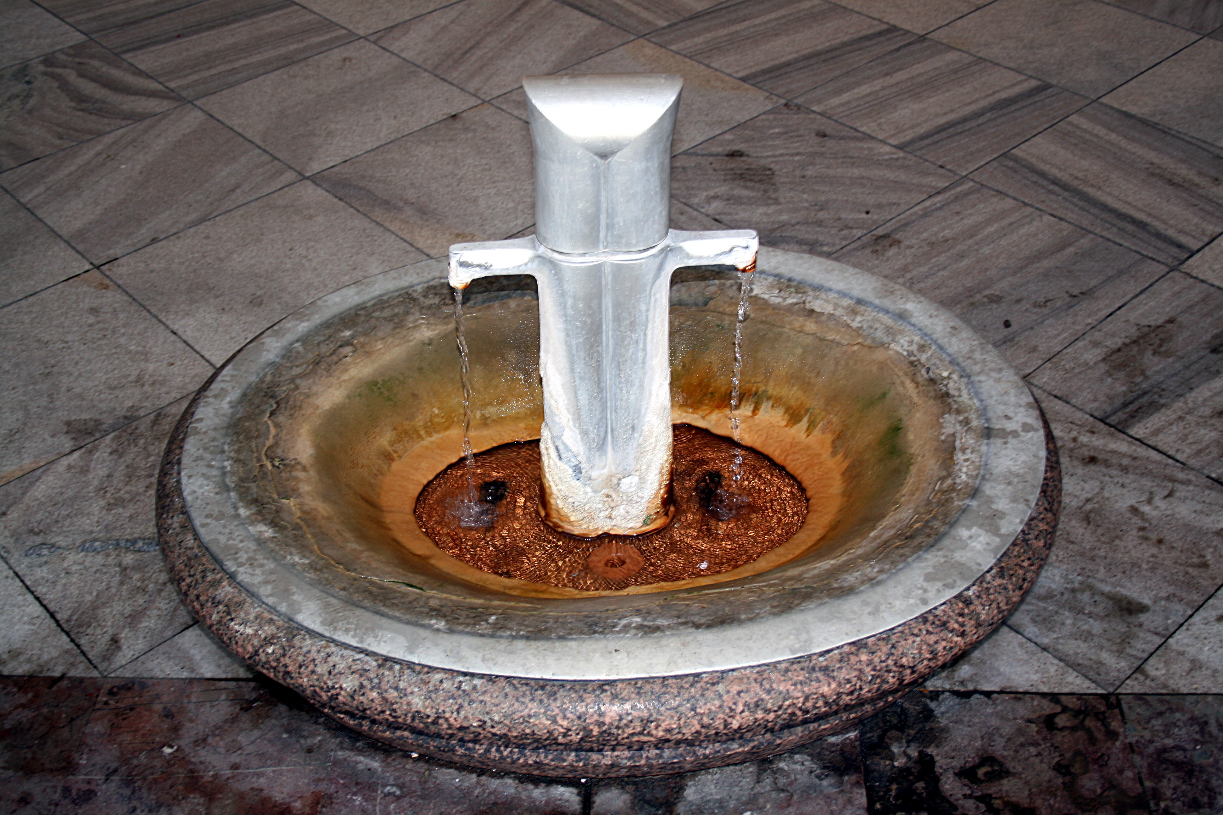 Karlovy Vary, Pramen "Mlýnský", 56°C